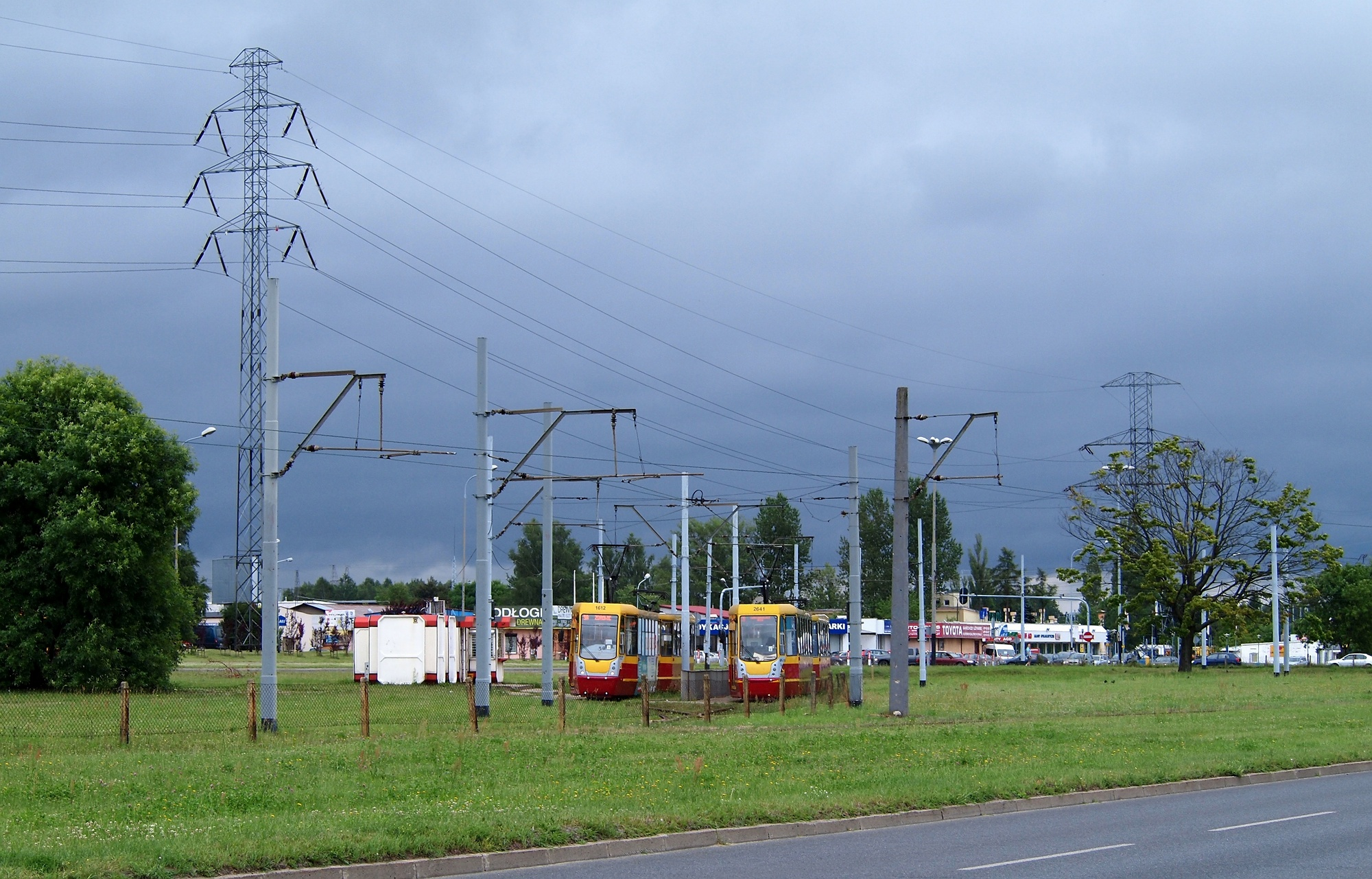 Trasa tramwajów będzie wydłużona do Della na Olechowie.